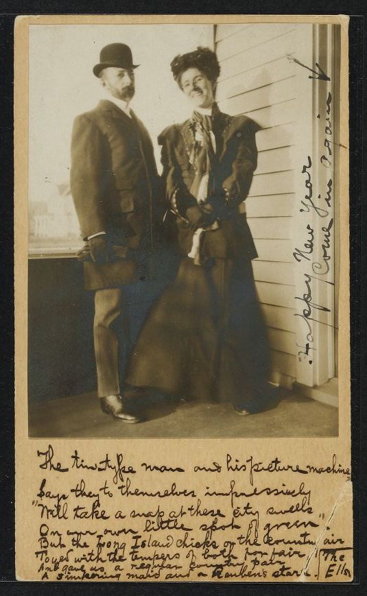 Charlotte Perkins Gilman and her second husband George Houghton Gilman